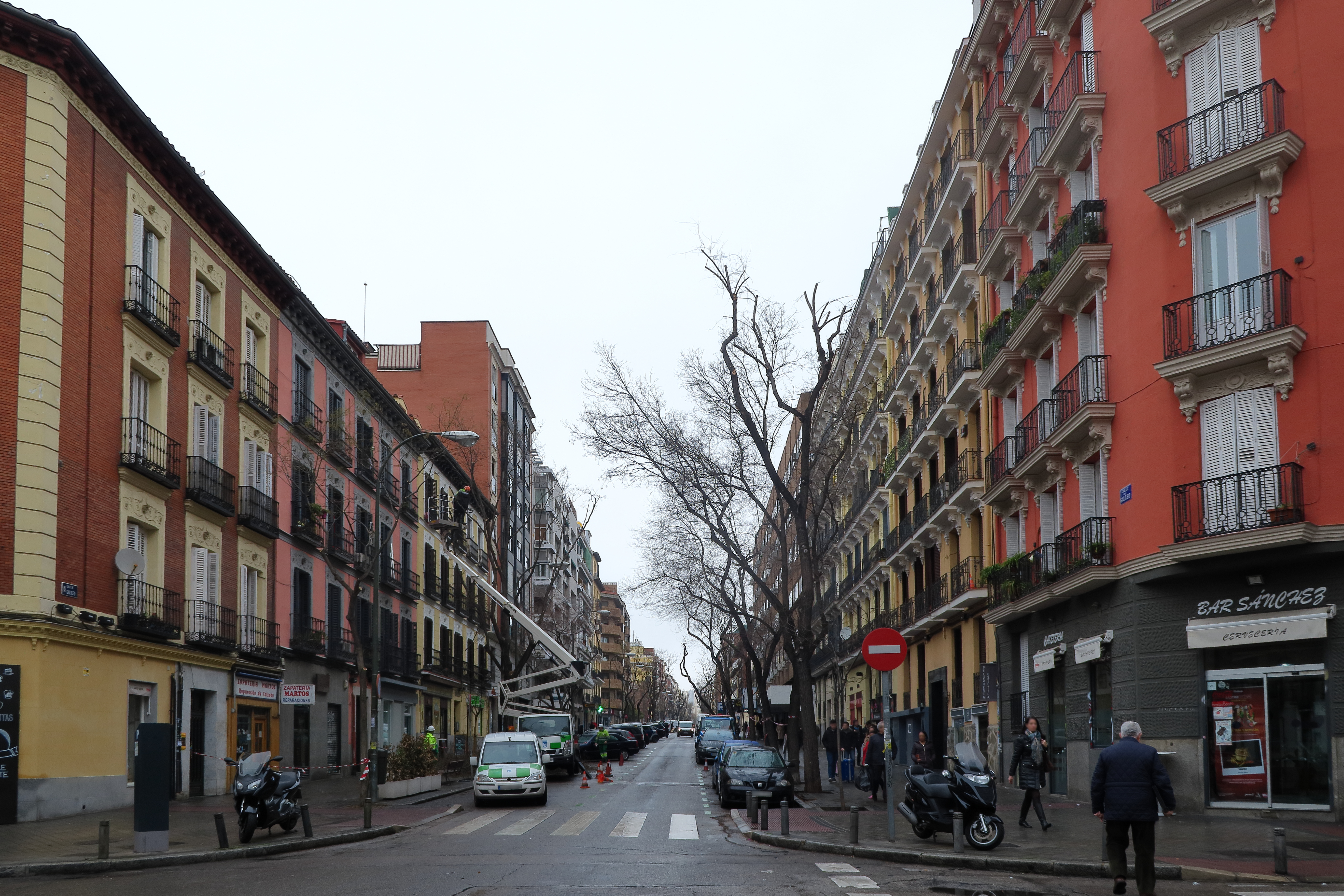 Calle Galileo, desde la calle Rodríguez San Pedro